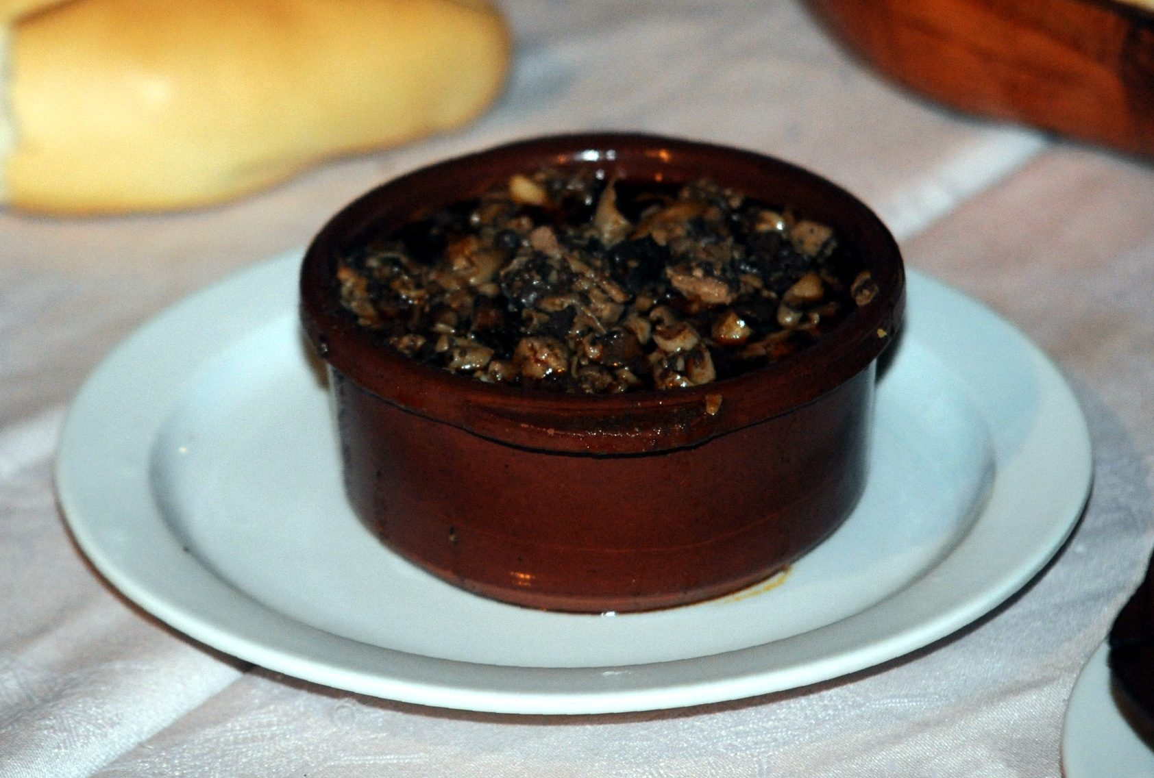 Chanfaina, plato típico extremeño. Foto realizada en Ceclavín